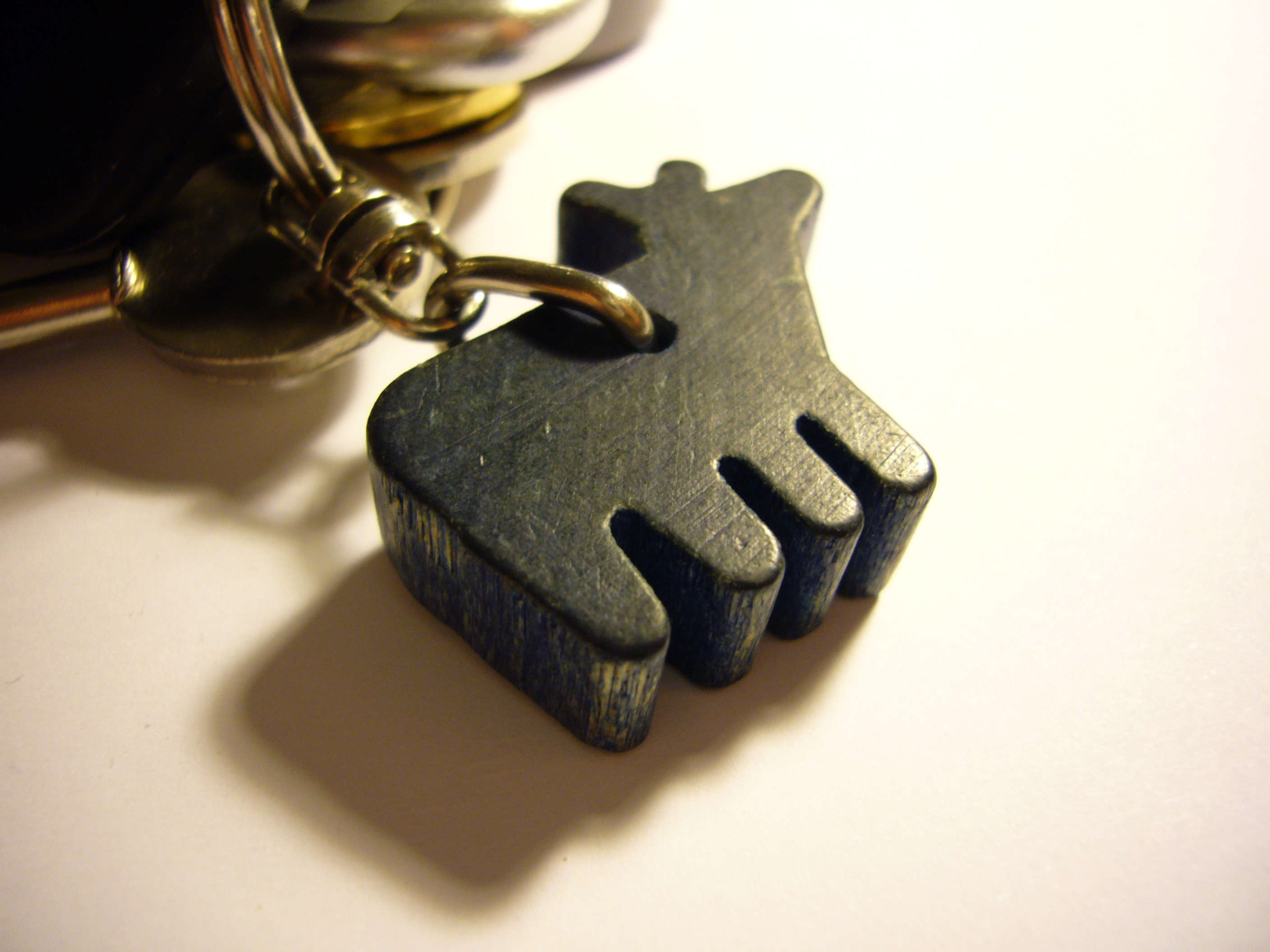 A key fob made by aarikka of Finland